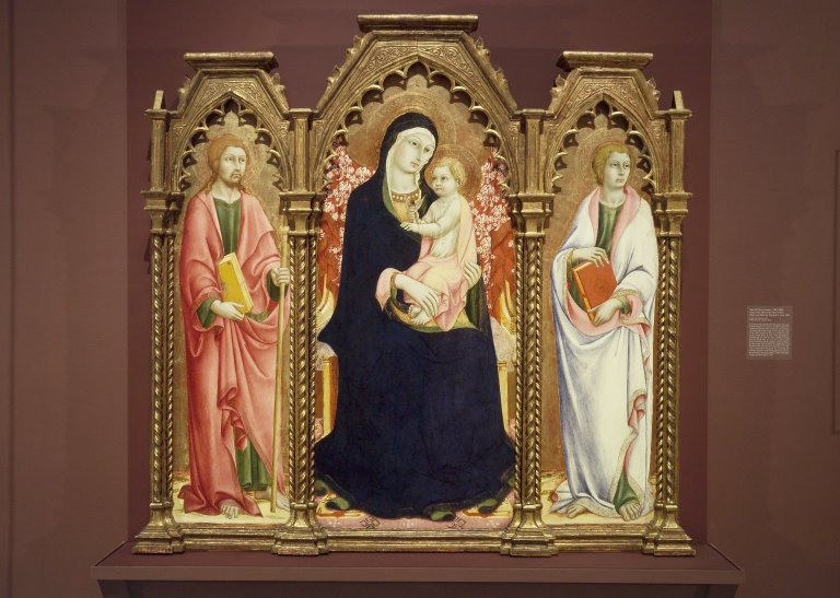 altarpiece